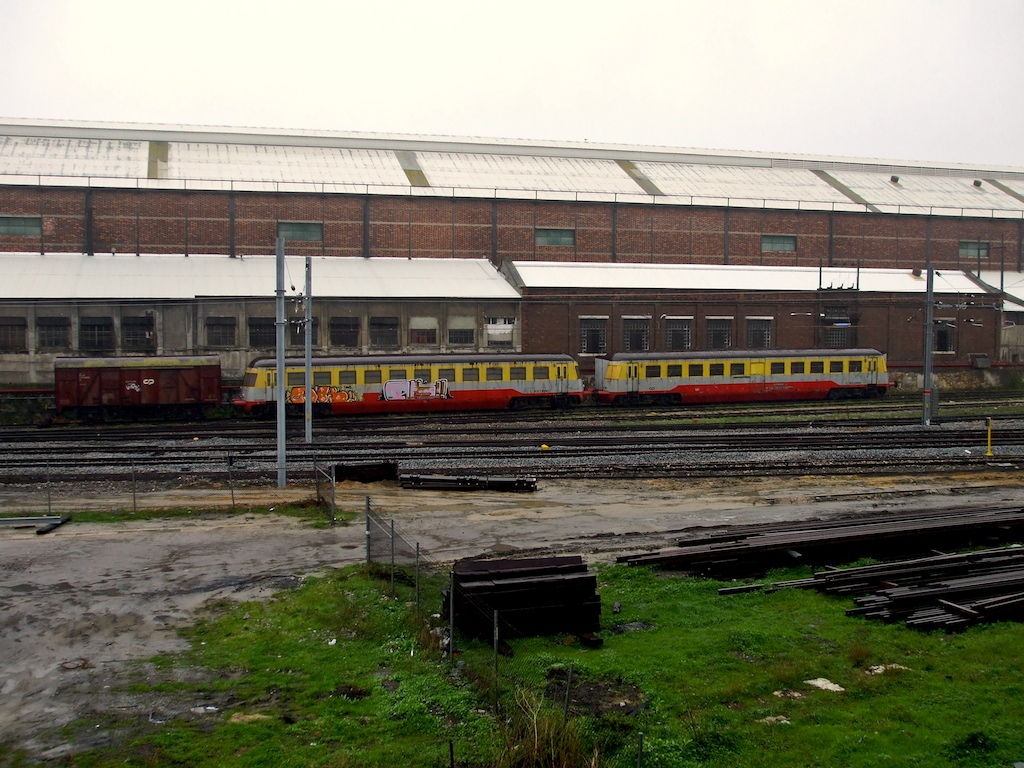 Tipo: Comboio-Socorro do Barreiro Local: Barreiro (EMEF-GOB) [Linha do Alentejo, PK 1] Data e hora: 13 de Dezembro de 2008 [12h11] Material: Vagão CP U + 2 Reboques Allan N.º s UIC: 40 94 945 5 007-5 + 60 94 99-29 002-9 + 60 94 99-29 001-1